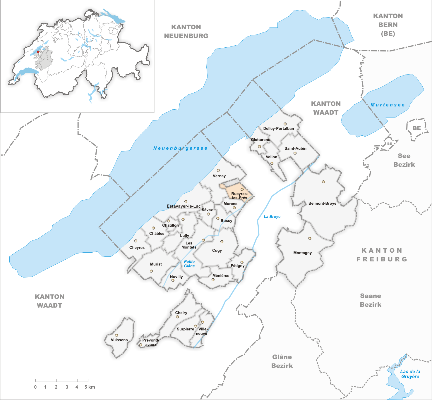 Municipality Rueyres-les-Prés